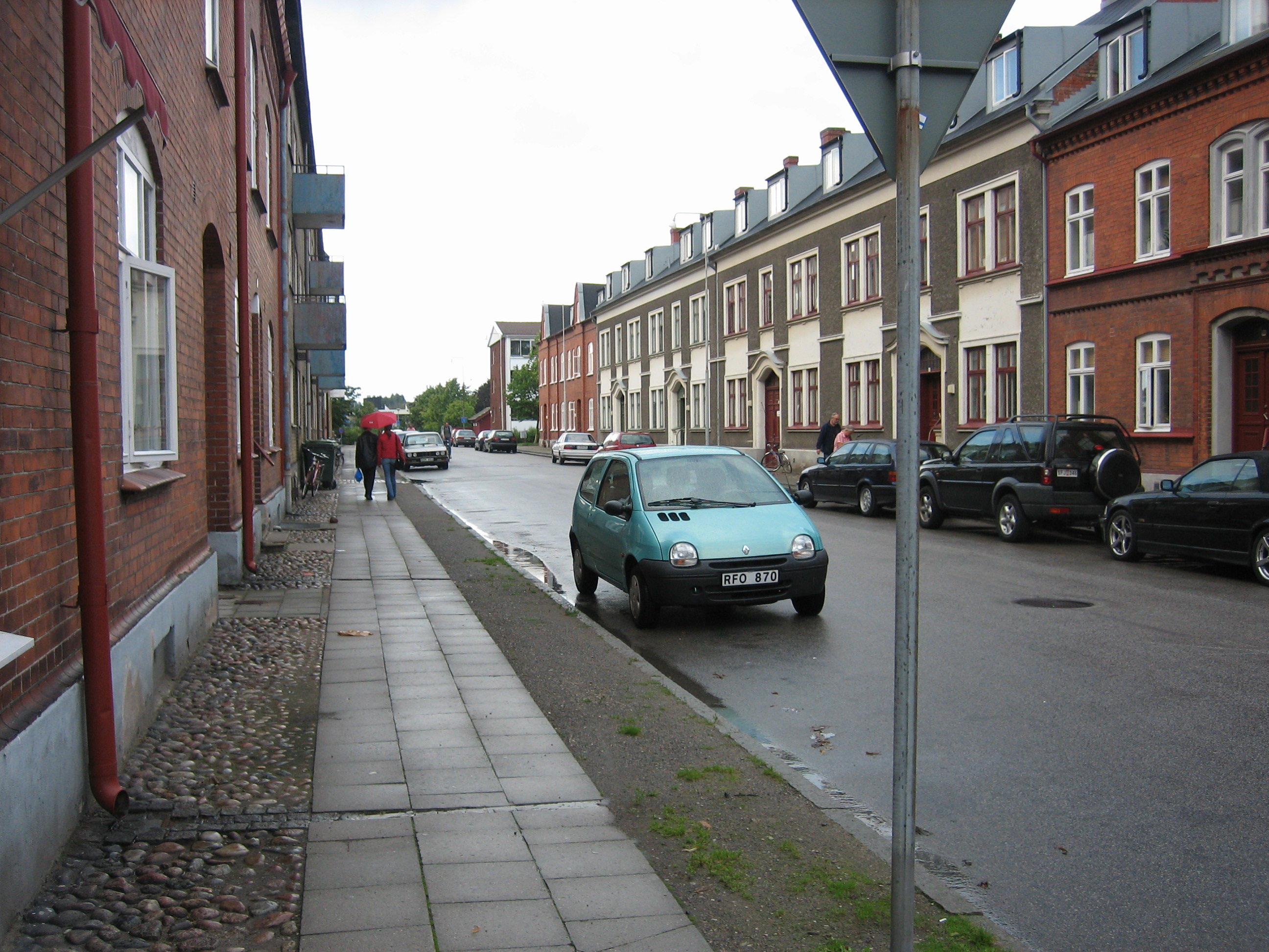 Mariagatan Ystad Sweden